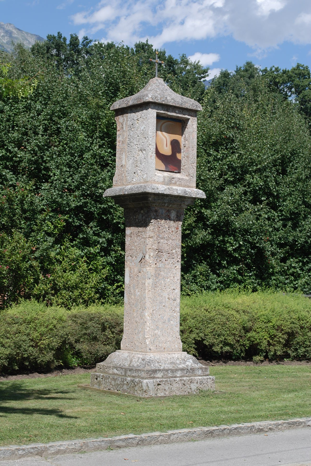 Bildstock hl. Notburga, Kranebitter Allee, Innsbruck This media shows the remarkable cultural object in the Austrian state of Tyrol listed by the Tyrolean Art Cadastre with the ID 116096. (on tirisMaps, pdf, more images on Commons, Wikidata)